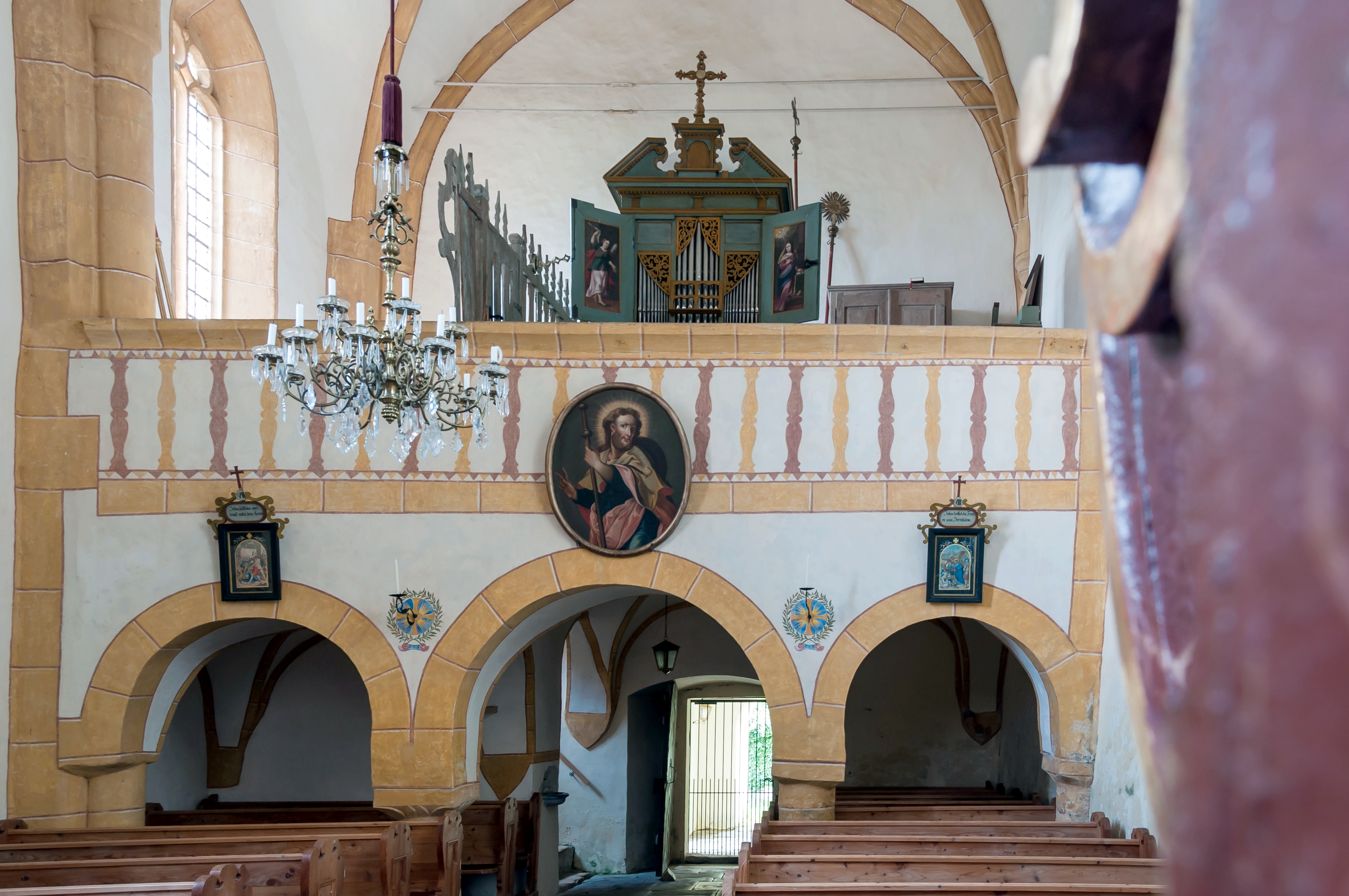 Kath. Filialkirche hl. Johannes d. T. mit ummauertem Kirchhof